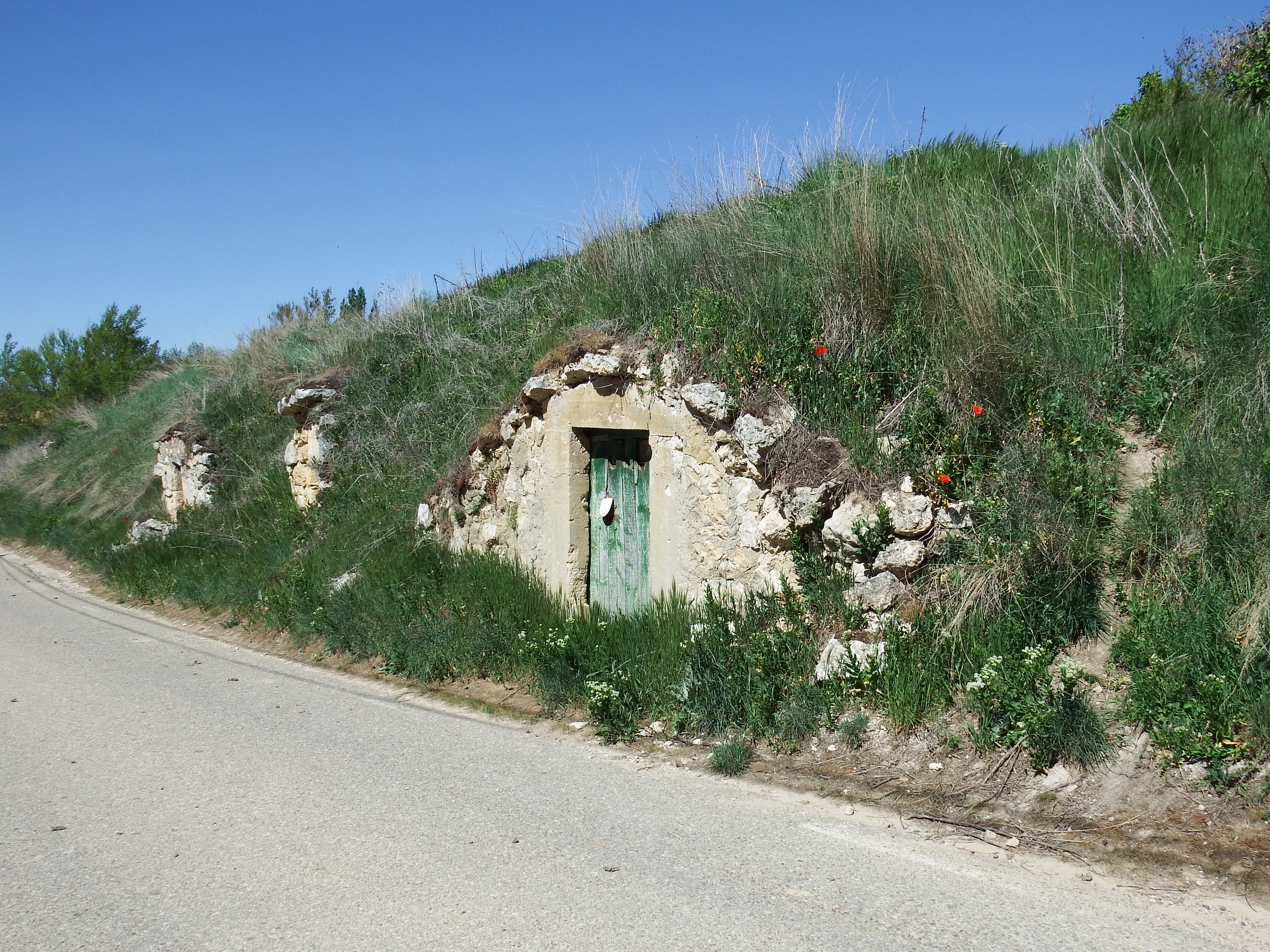 Bodegas en Pinilla Trasmonte